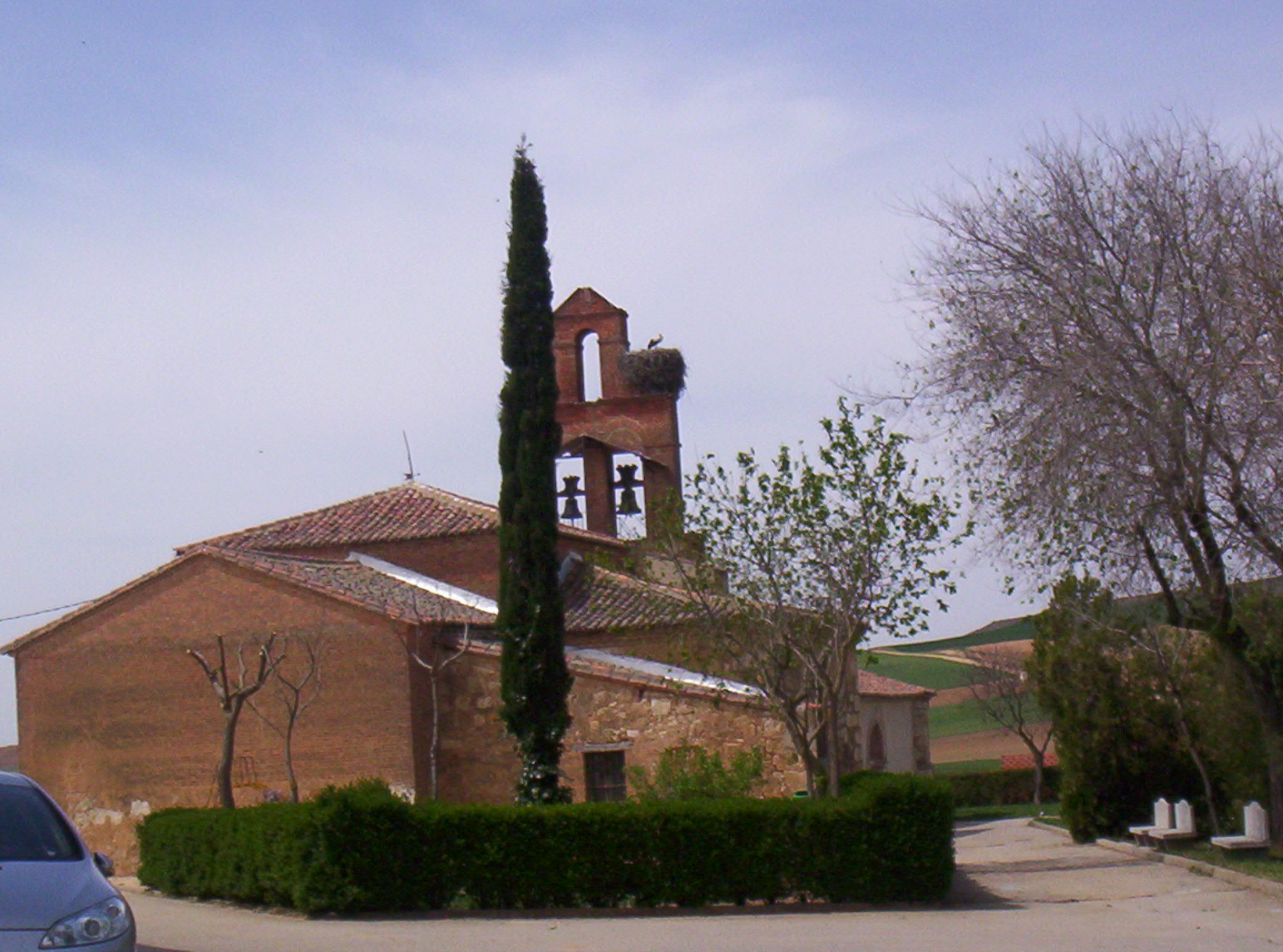 Iglesia de San Juan Bautista en Gallegos del Pan (Zamora)